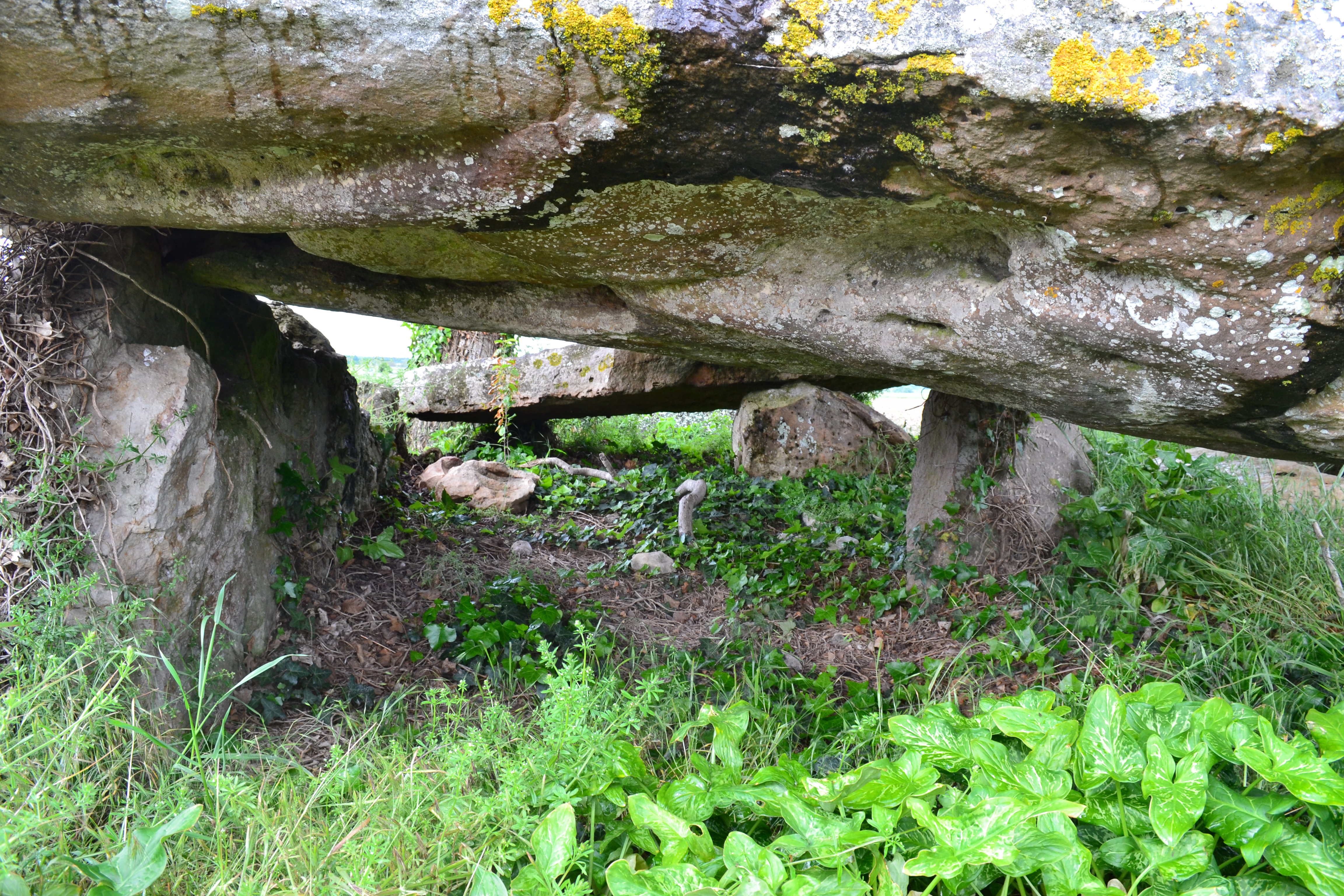 Pierre couverte du Mousseau, Les Ulmes.